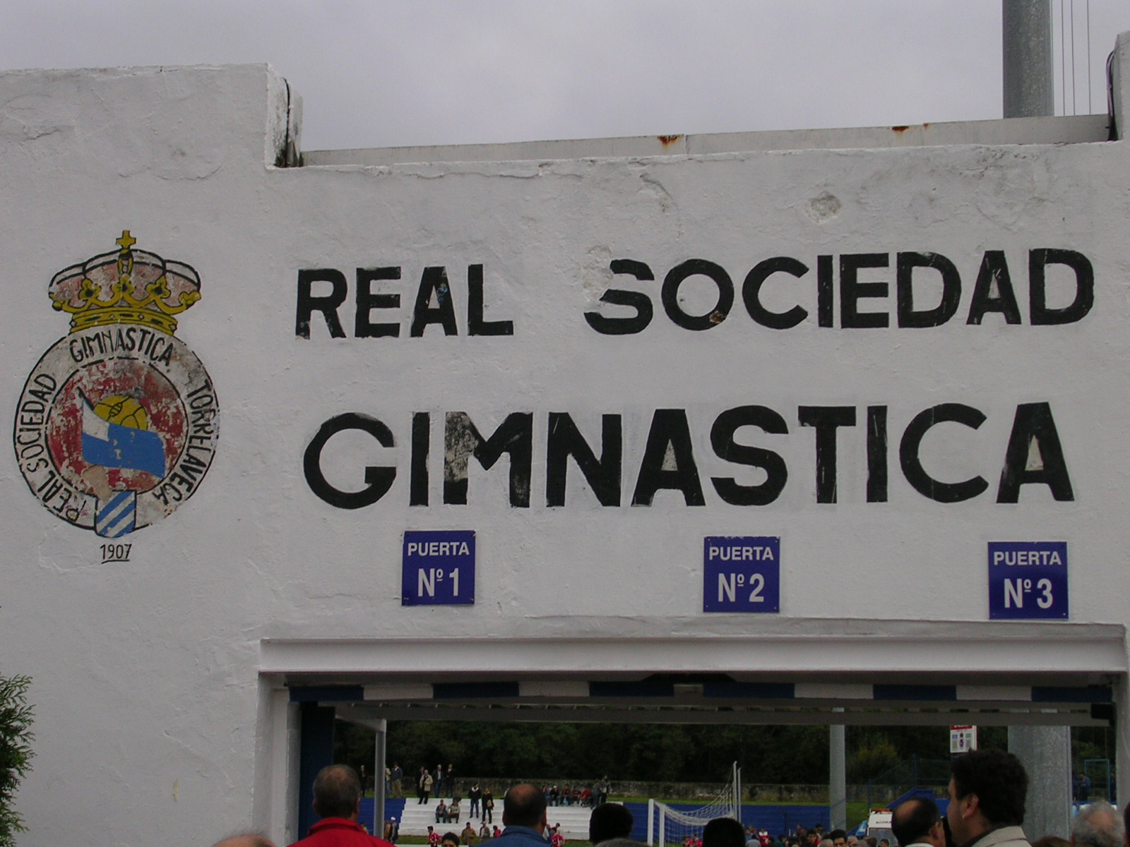 Entrada a los Campos del Malecón en 2004, antes de su remodelación.